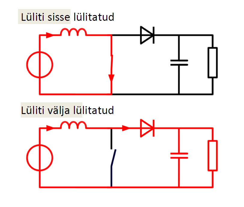 See on File:Boost operating.svg eestikeelse tekstiga